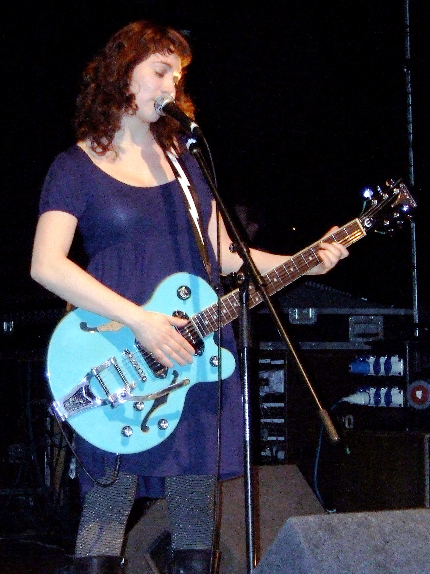 Regina Spektor performing at Wolverhampton